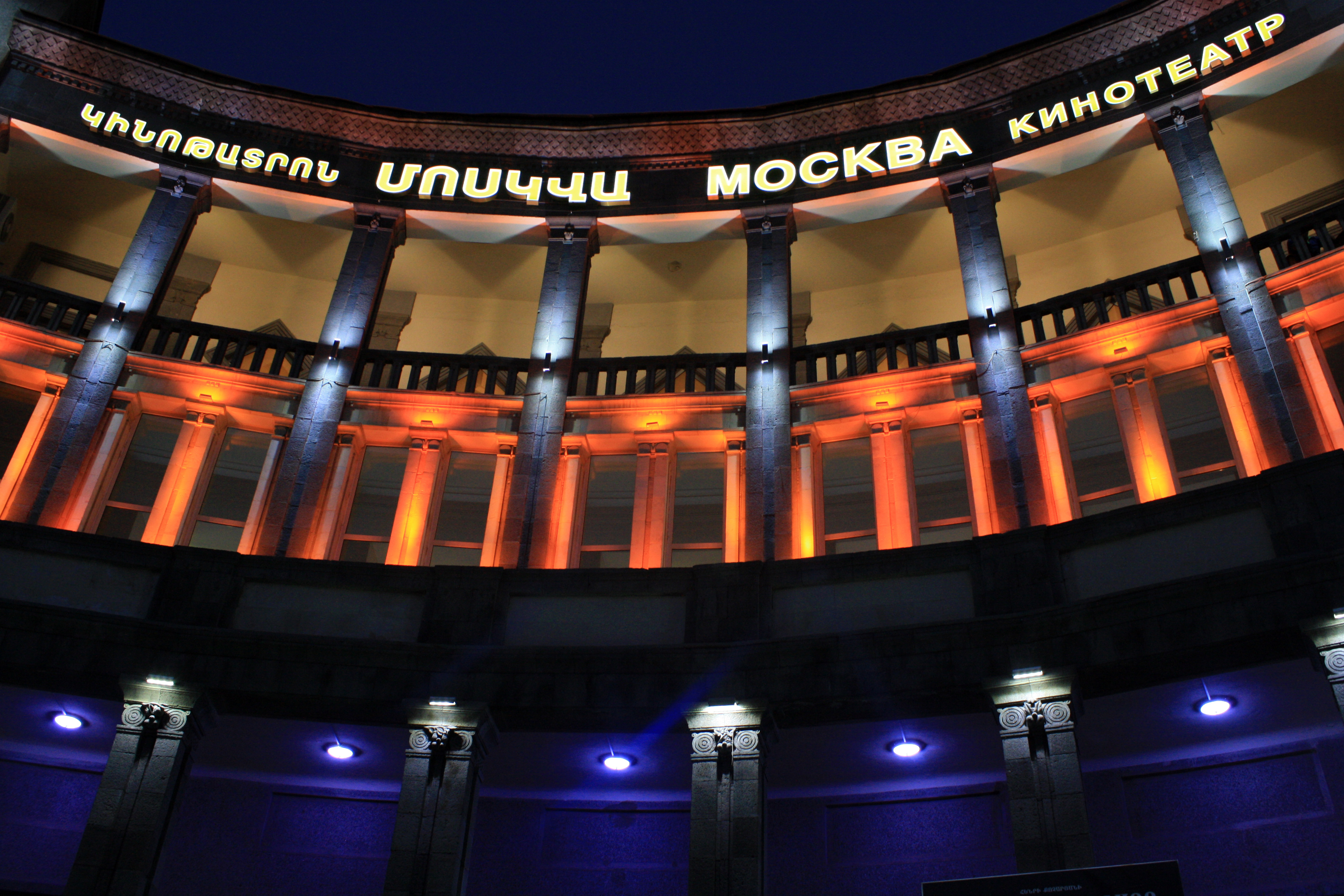 Կինոթատրոն «Մոսկվա» գիշերը 6/178.3.1